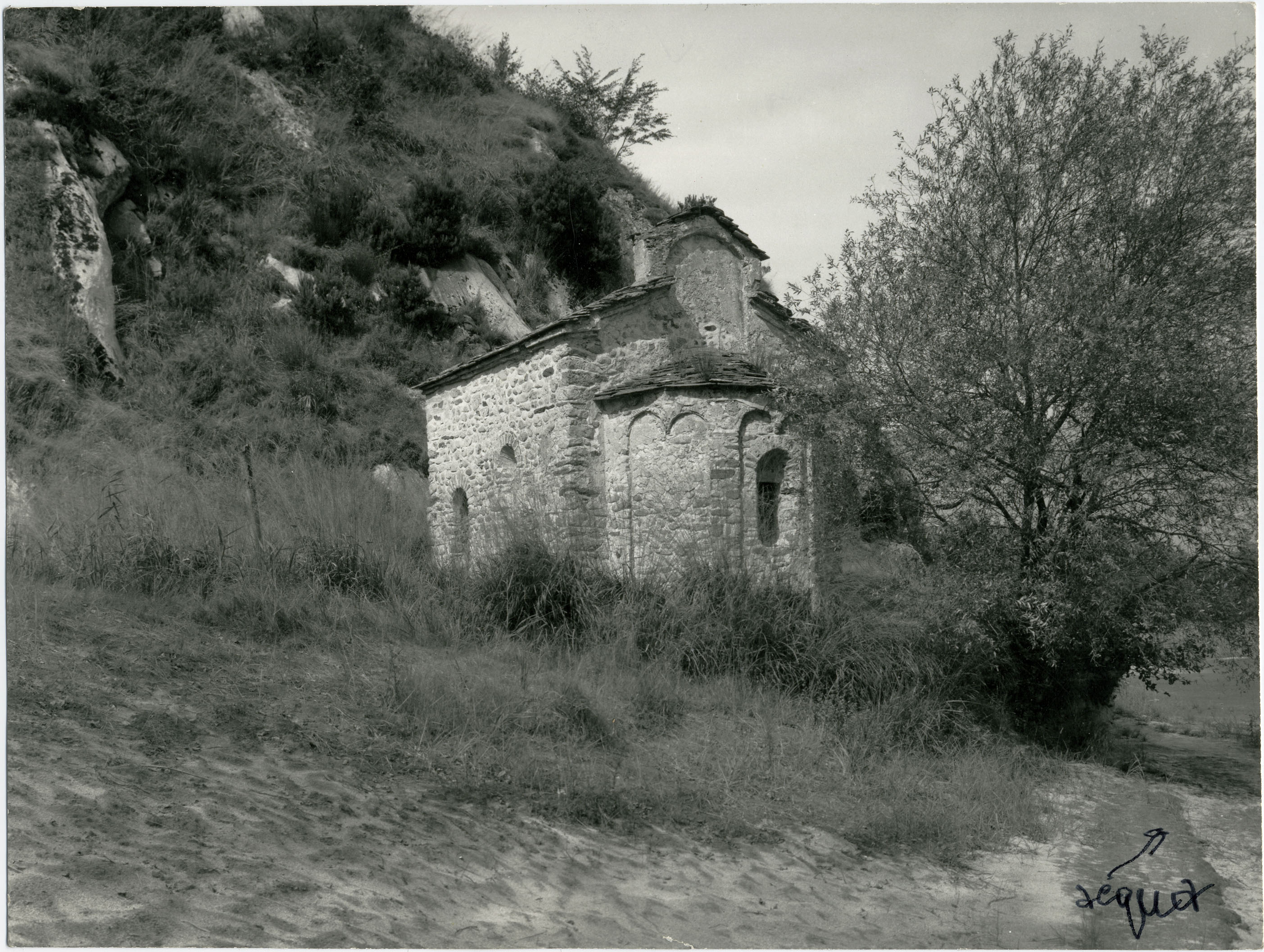 Novate Mezzola - tempietto di S. Fedelino. Archivio Pietro Pensa, fondo fotografico, selezione di Elvia Redaelli, 2008, n. 85.